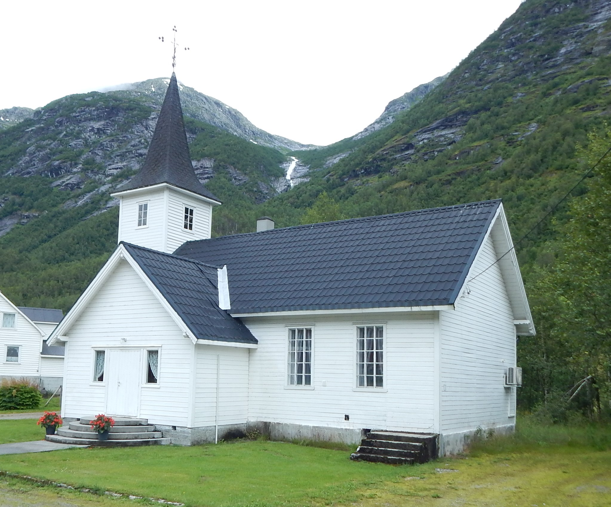 Veitastrond kapell